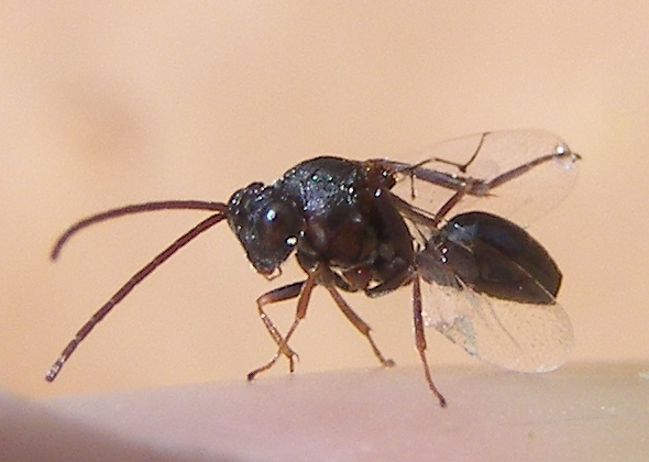 Callaspidia sp (Figitidae )